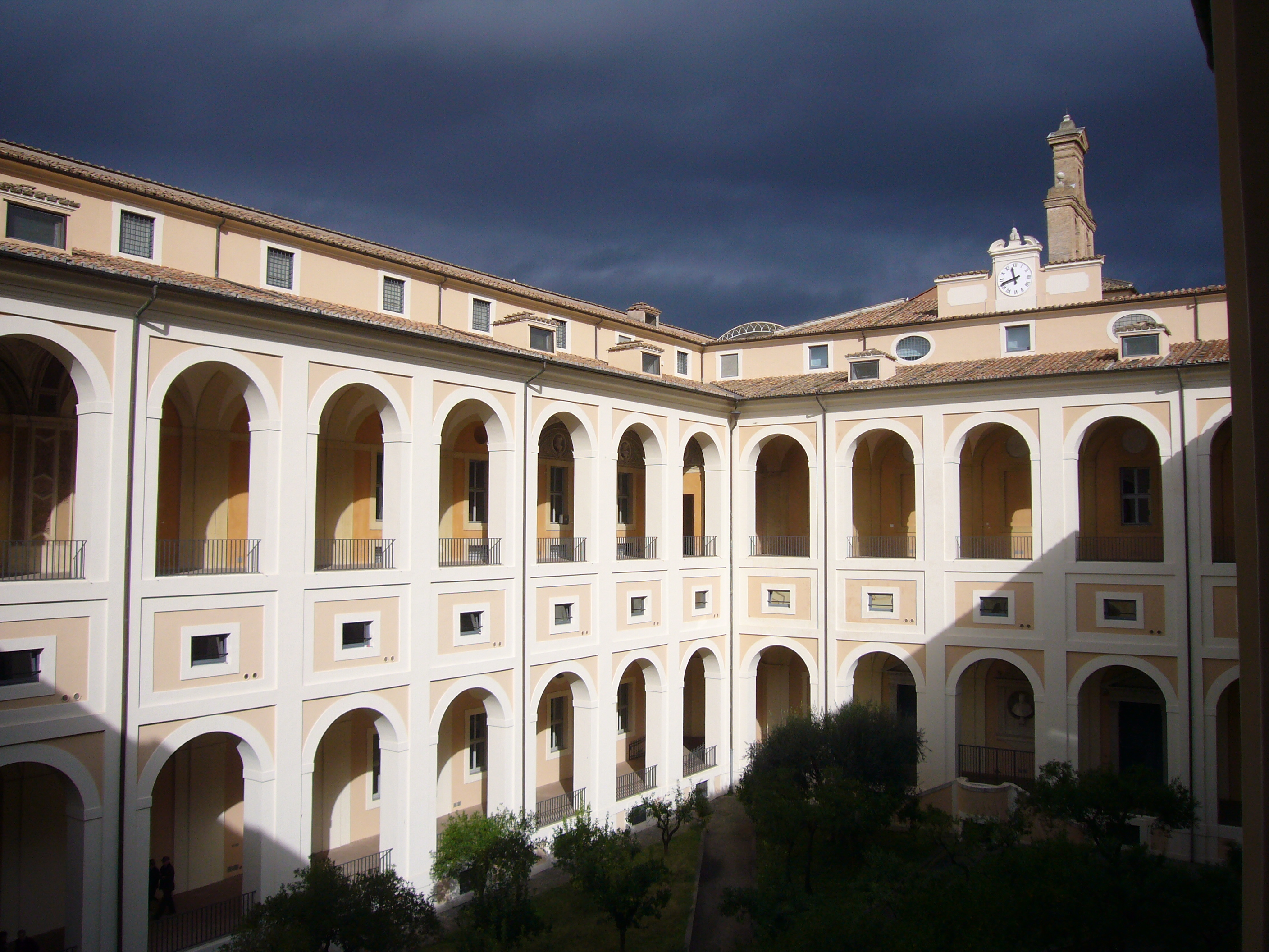 Roma, Istituto San Michele: cortile dei vecchi